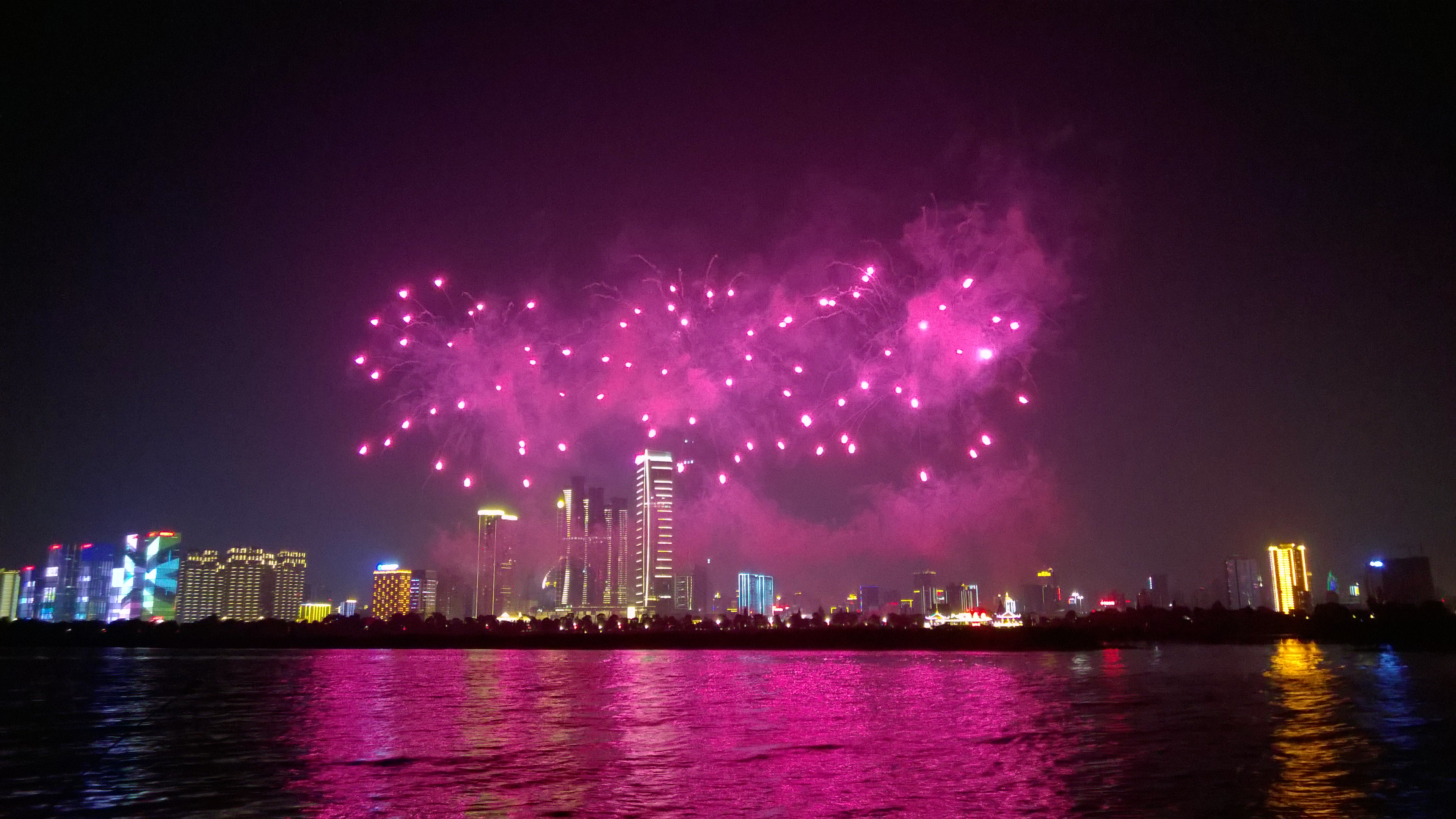 拍摄于橘子洲西岸的潇湘路